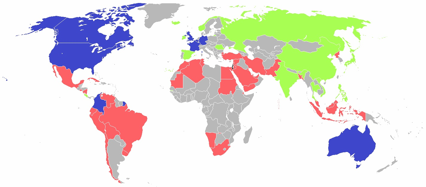 Reazioni internazionali a "Margine Protettivo"